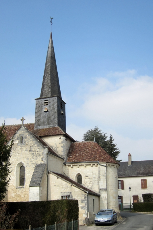 Villegouin (Indre) - Eglise Notre-Dame